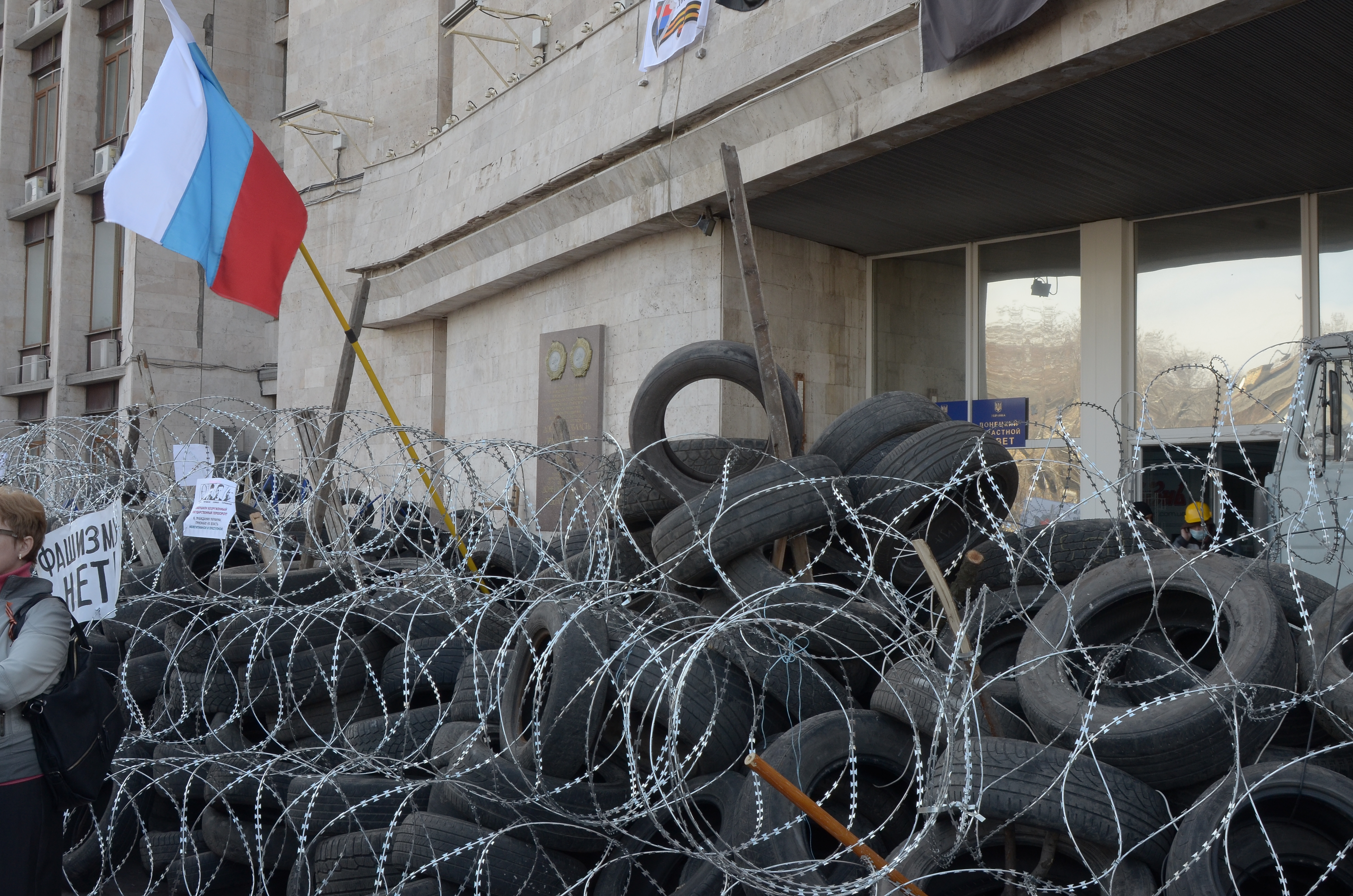 Протесты в Донецке